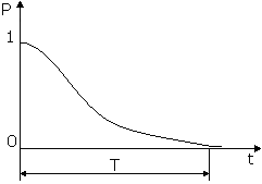 зависимость вероятности безотказной работы от времени